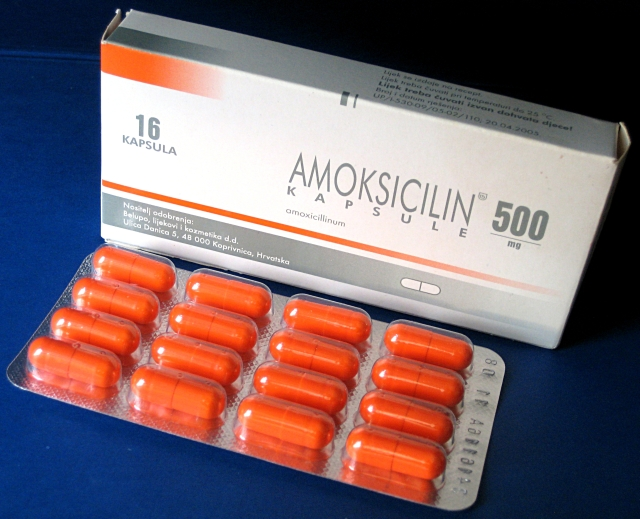 Fotografija lijeka Amoksicilin